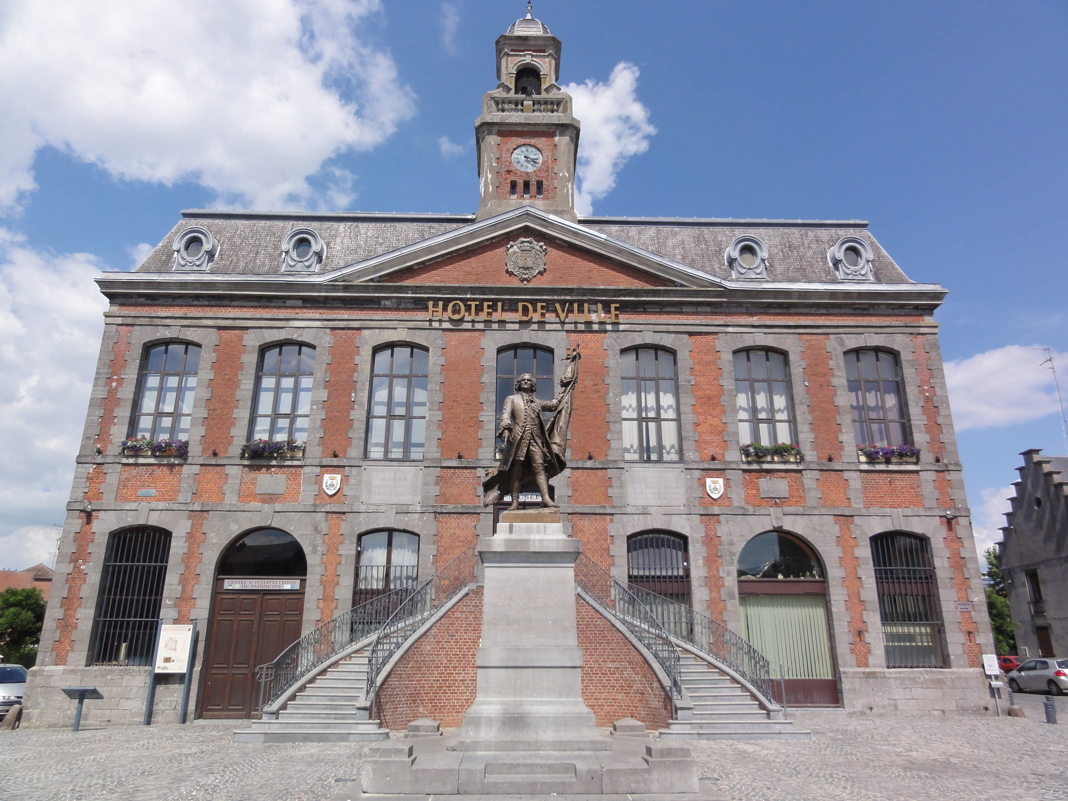 Landrecies (Nord, Fr) Hotel de ville et statue Dupleix